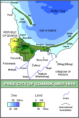 Wolne Miasto Gdansk_Republic of Gdansk/1807-1815